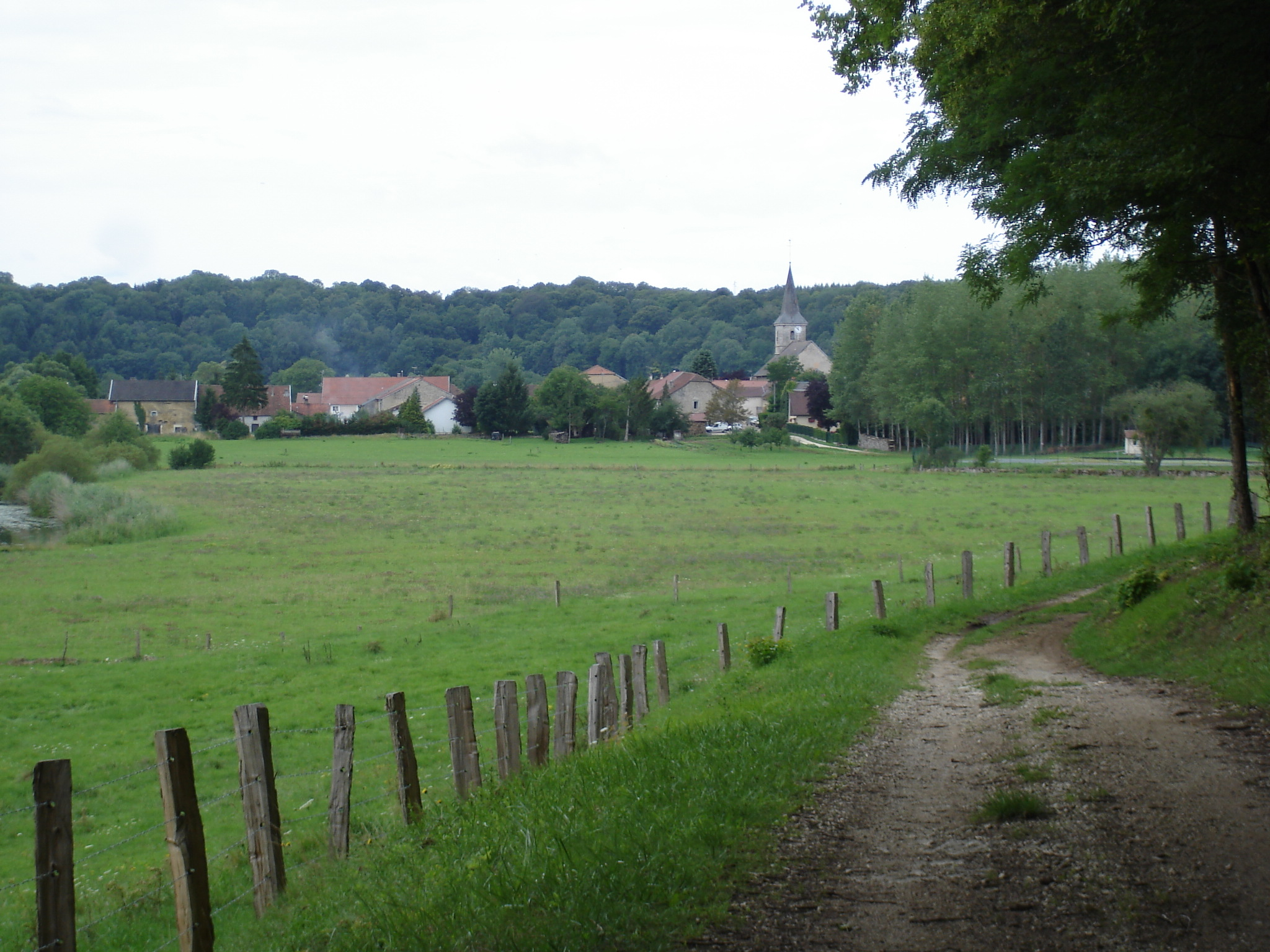 Haréville-les-Chanteurs en approchant du nord